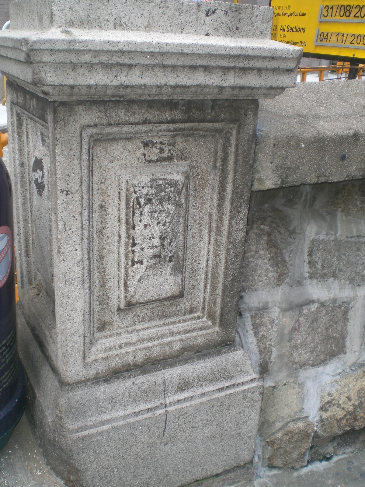 中文（香港）: 西營盤德輔道西130號西營盤賽馬會分科診所, 此石始放置於zh:國家醫院時代.